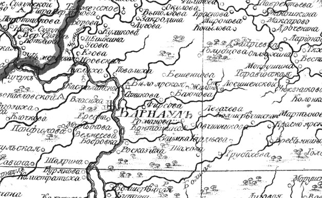 Деревня Санникова и ближайшие населённые пункты. Фрагмент карты Колыванского наместничества (1792 г.). Карта составлена Е. Харитоновым и включена в "Россiйской атласъ, изъ сорока четырехъ картъ состоящiй и на сорокъ два намѣстничества Имперiю раздѣляющiй", изданный в 1792 году в Санкт-Петербурге.